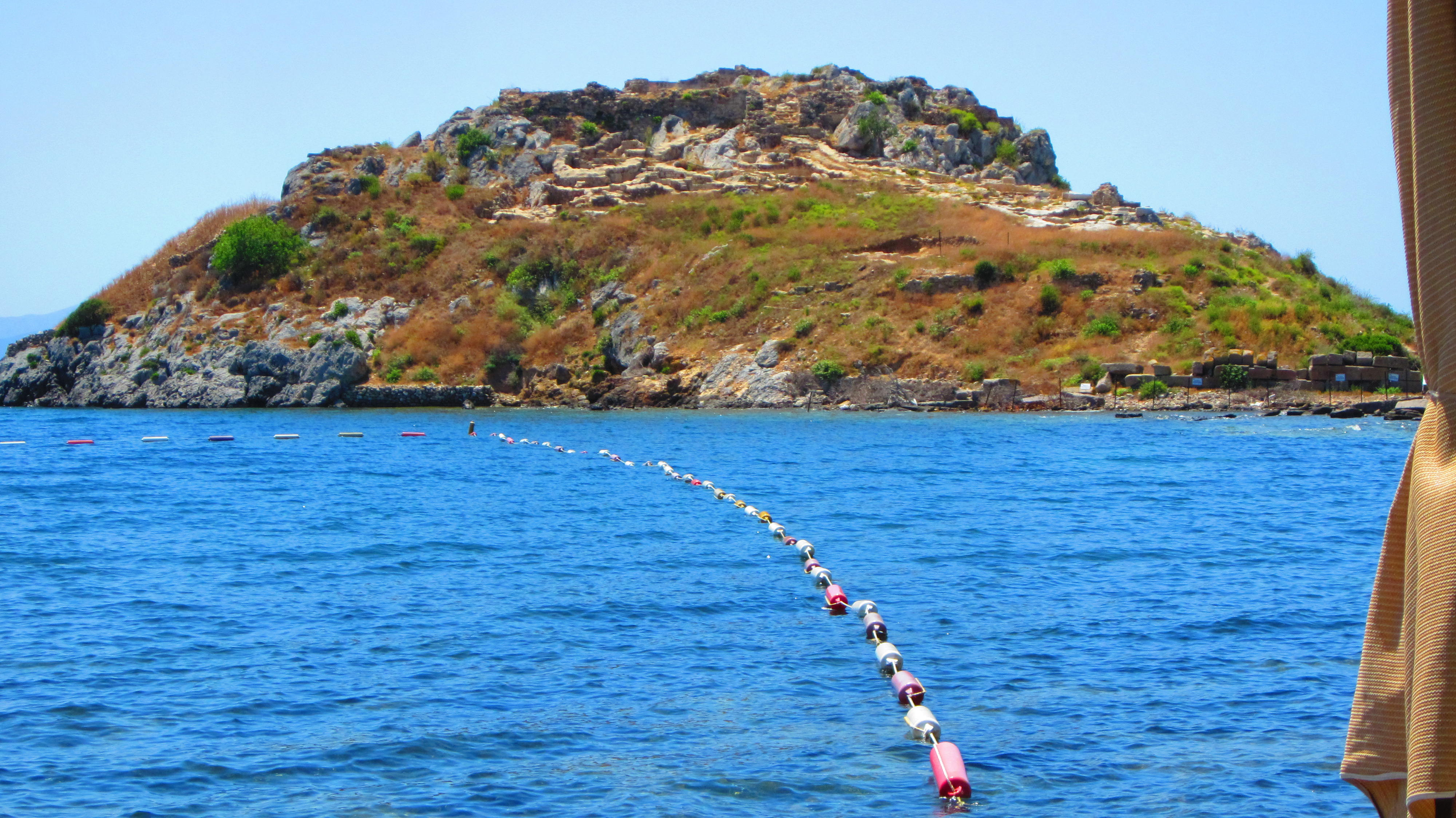 Tavsan adasi/Gümüsluk/Bodrum /Turkey by Yilmaz Ovunc